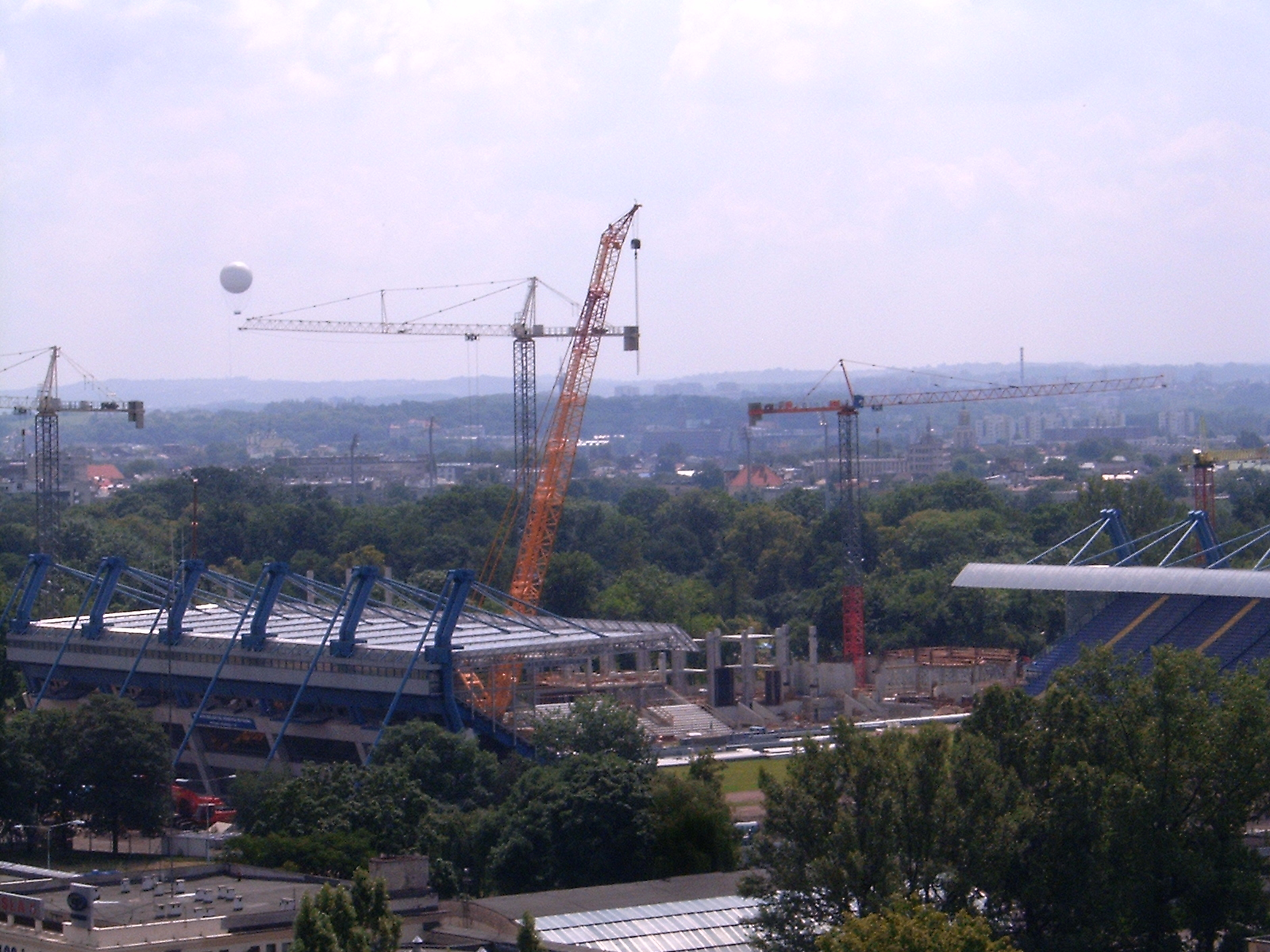 Wisła Kraków Stadion Rozbudowa